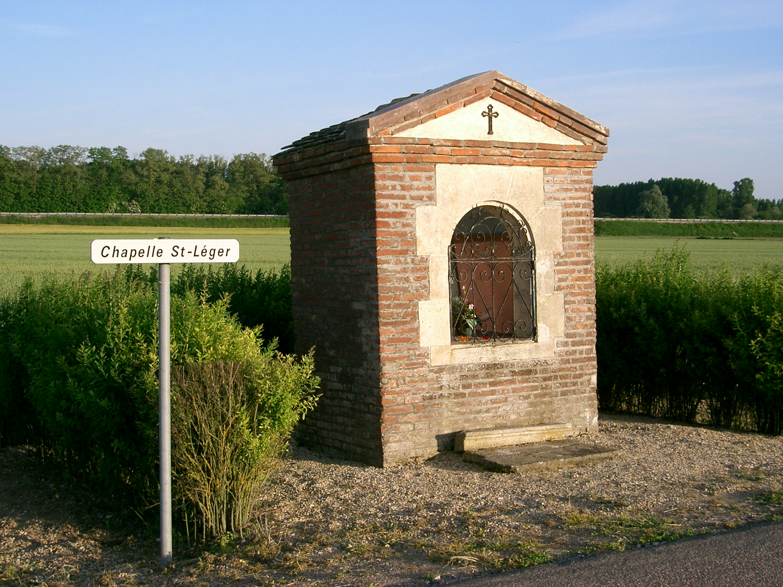 Chivres (France - 21) - la chapelle saint Léger self made PRA